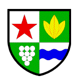 Герб на Бобошево